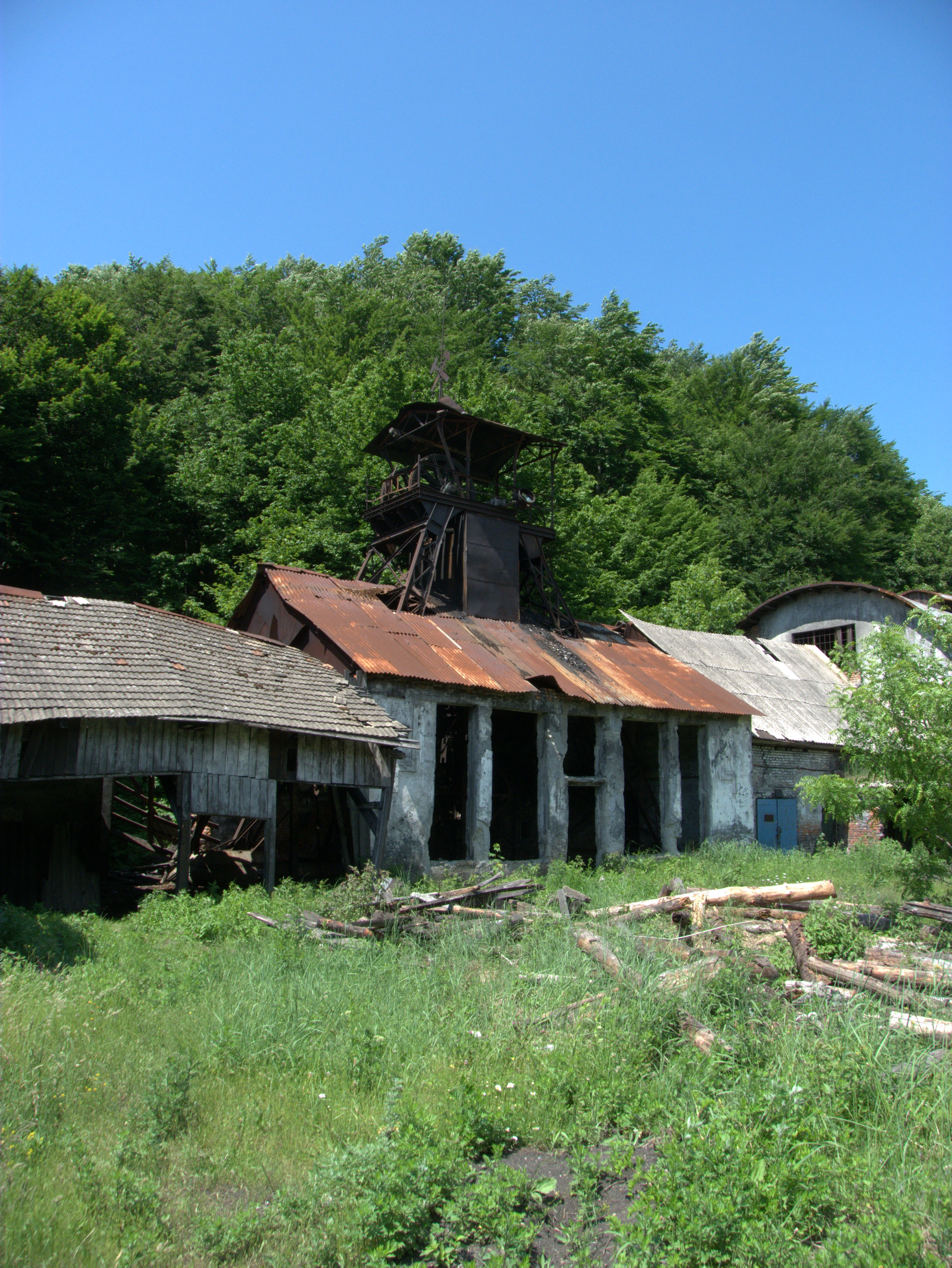 Zaniklá šachta 6 km od Eibenthálu. Po důlním neštěstí v roce 2006 nebyla těžba obnovena.